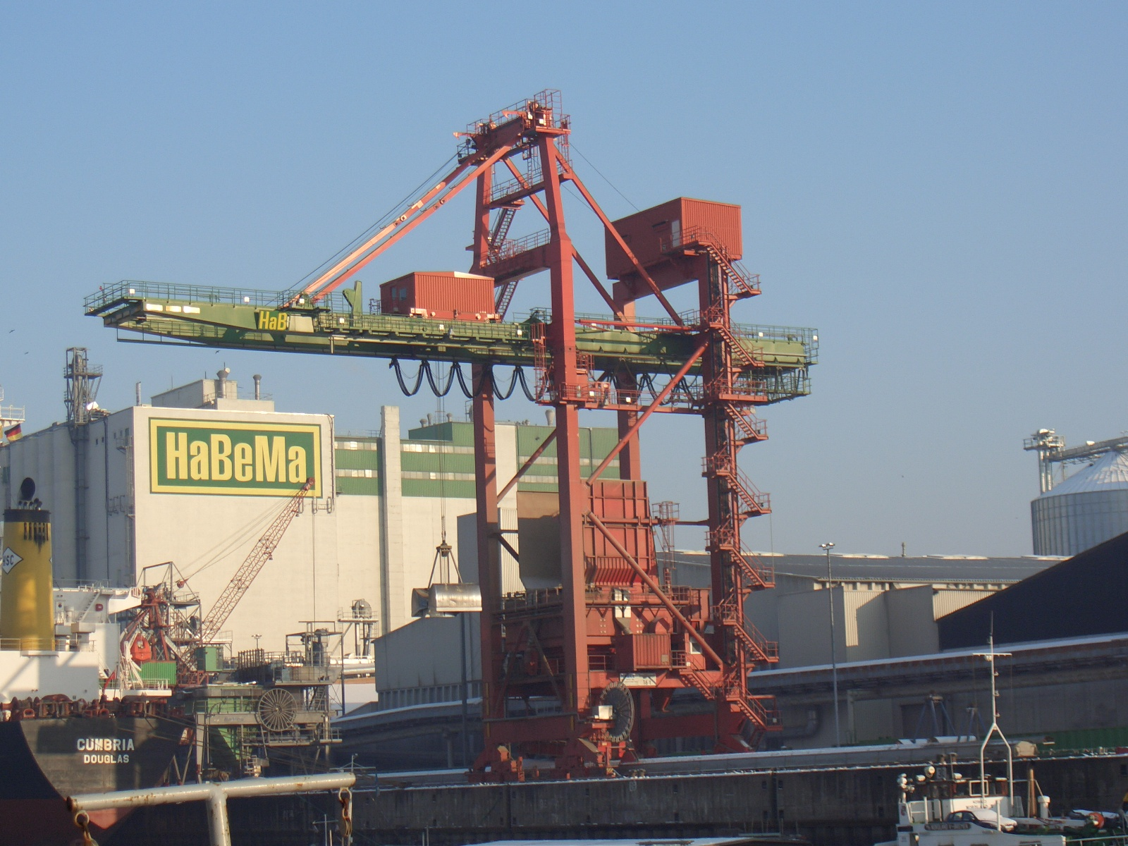 Elevator